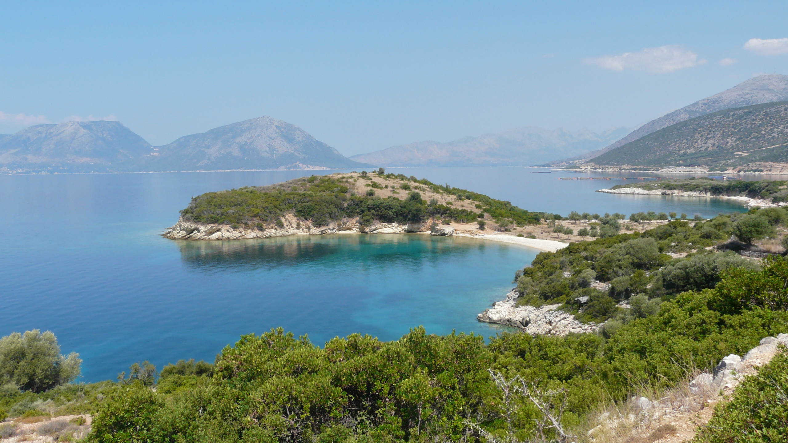 ASTAKOS - GREECE